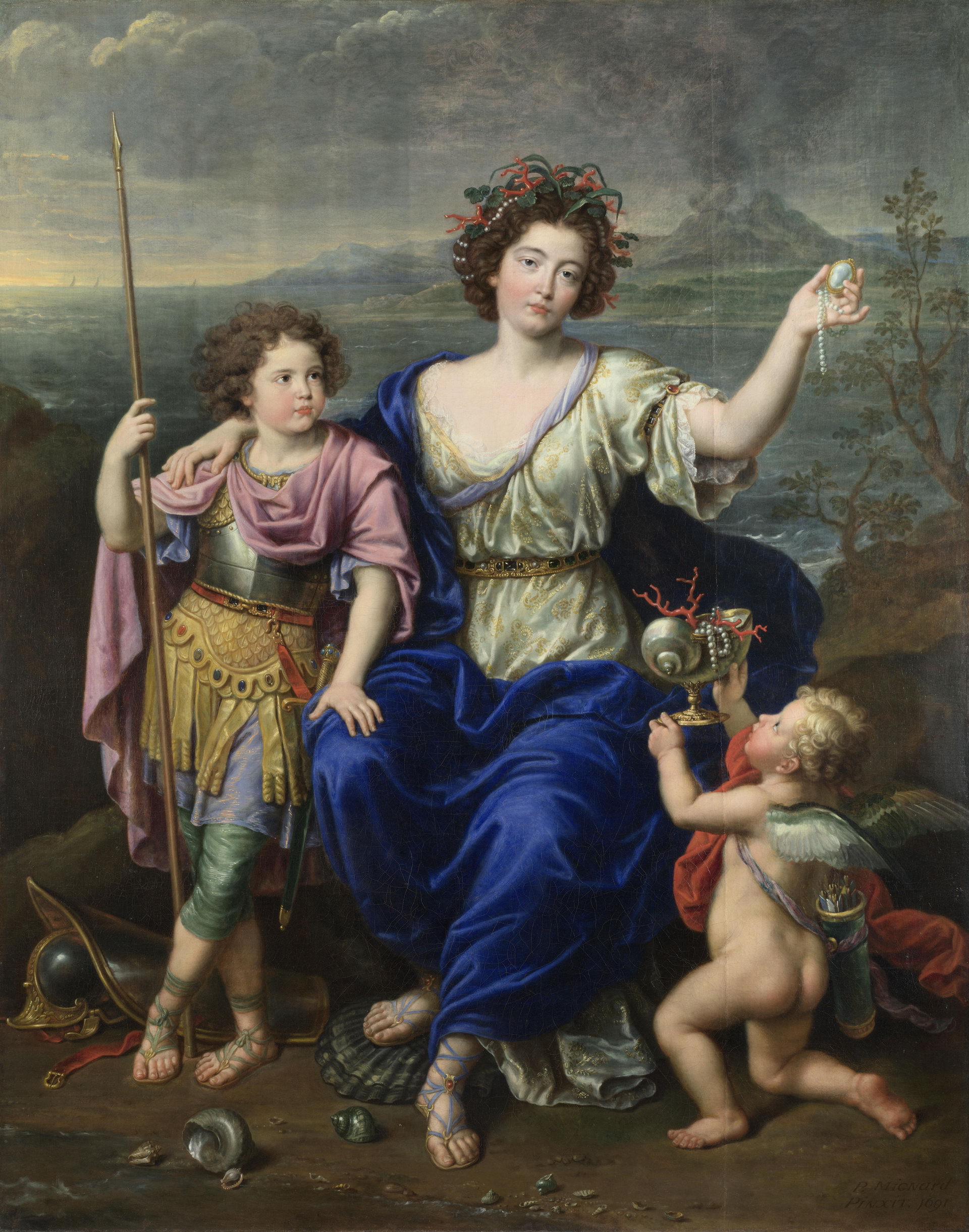 Catherine Thérèse de Goyon de Matignon-Thorigny (1662-1699), nuera de Colbert, representando a Tetis y sus hijos como Aquiles y Cupido.